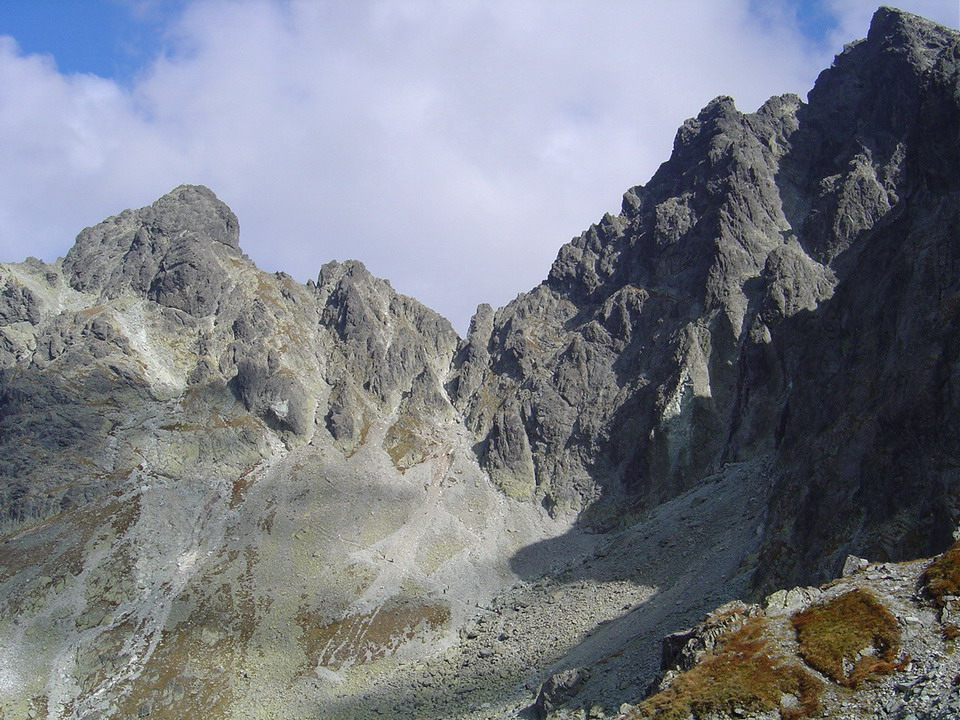 Diva veza and Vychodna Vysoka from Polsky hreben